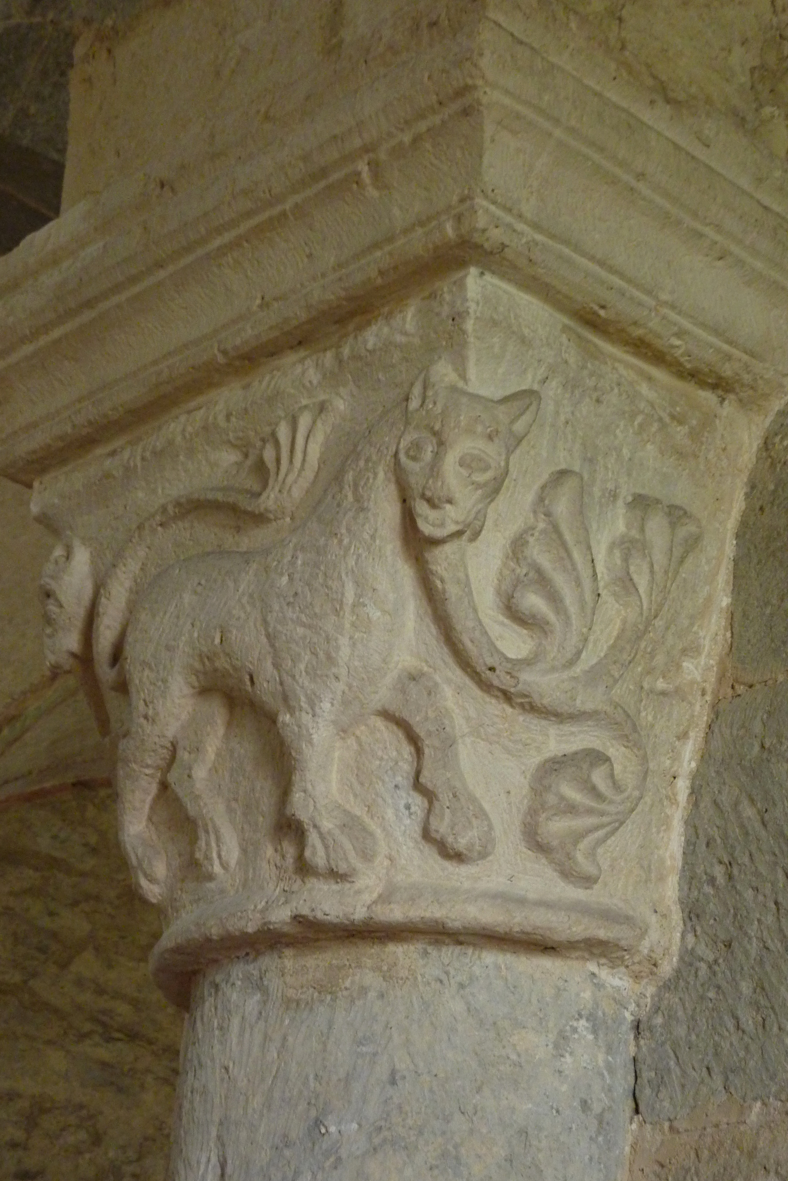 Evangelische Kirche St. Gallus in Brenz an der Brenz, einem Ortsteil von Sontheim an der Brenz (Baden-Württemberg), Kapitell